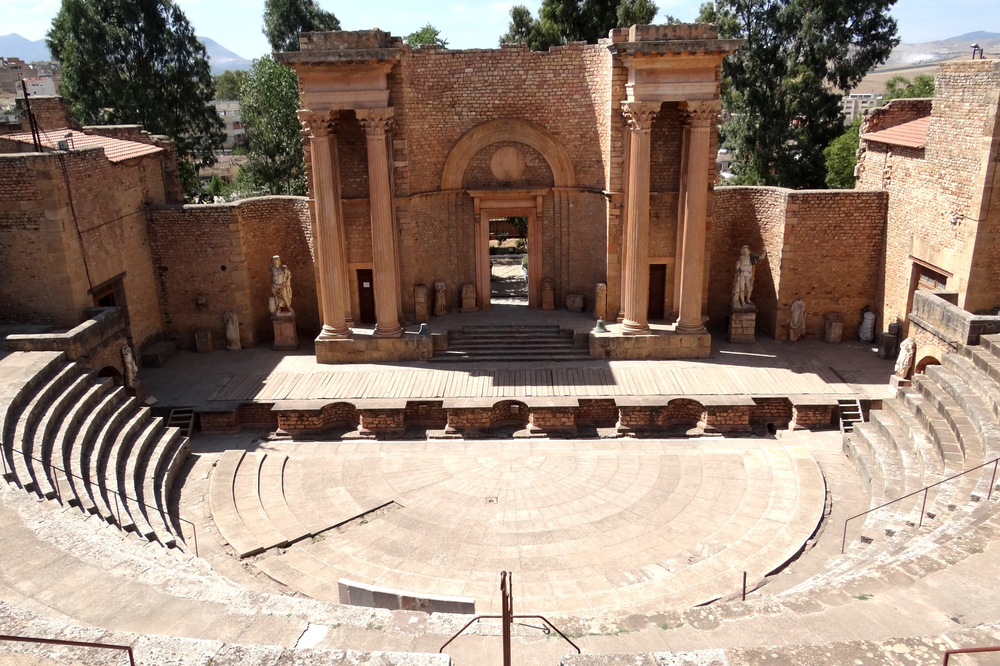 Theatre romain à Guelma